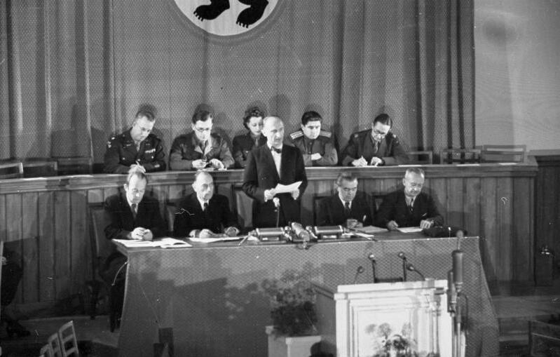 Zentralbild Neuwahl des Berliner Magistrates am 5. Dezember 1946. Stadtverordneten-Vorsteher Dr. Suhr bei seiner Eröffnungsrede. (rechts von Suhr Ottomar Geschke, dahinter die 4 Vertreter der 4 Besatzungsmächte).